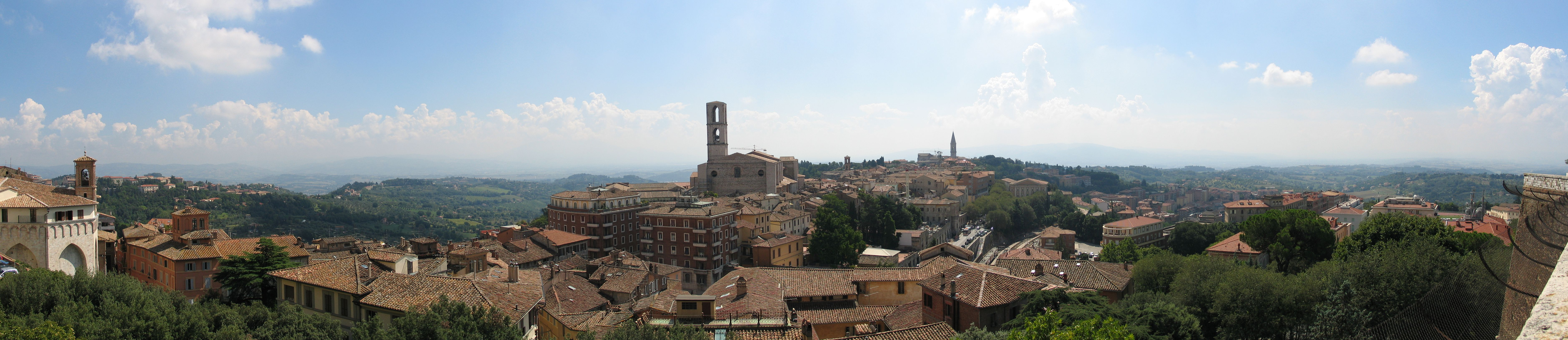 Altstadt von Perugia - Panoramabild